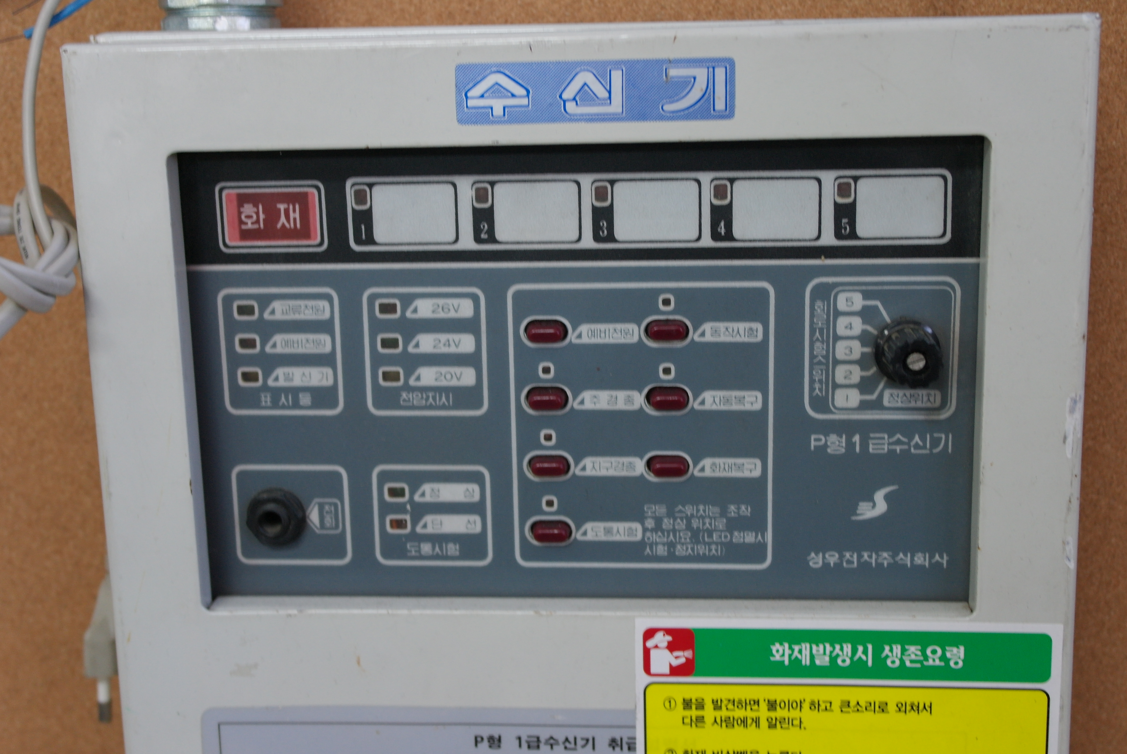 Photos of Gangneung Fire Station